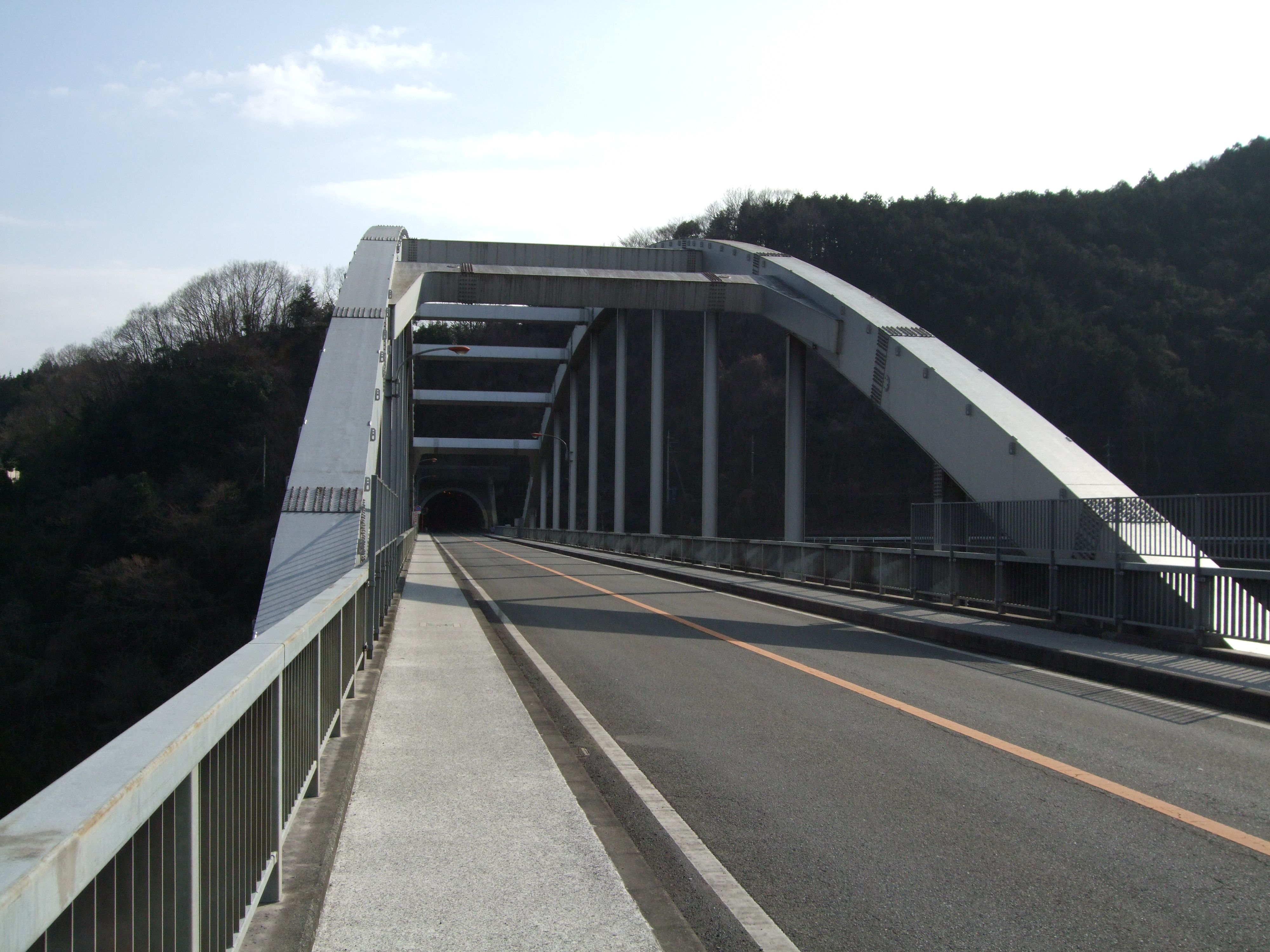 Katsurabashi1